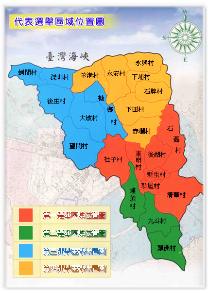 新屋區次分區